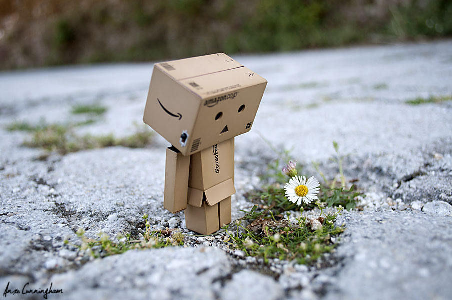 Danbo likes flowers